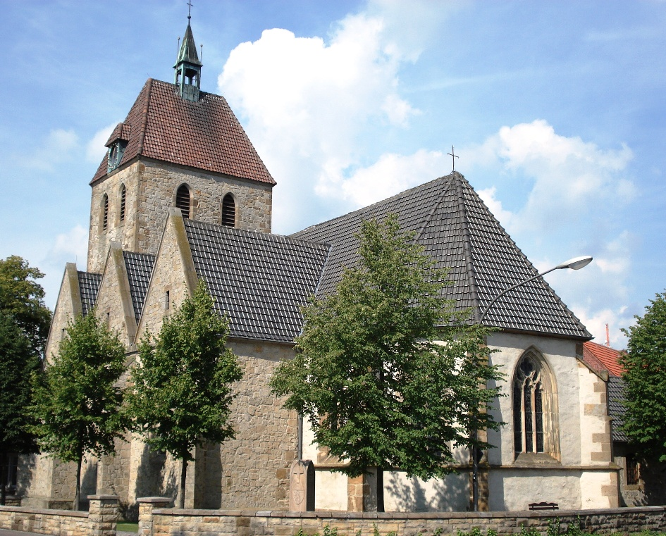 Kirche St. Anna in Dreierwalde, Stadtteil von Hörstel, Kreis Steinfurt, Nordrhein-Westfalen, Deutschland.